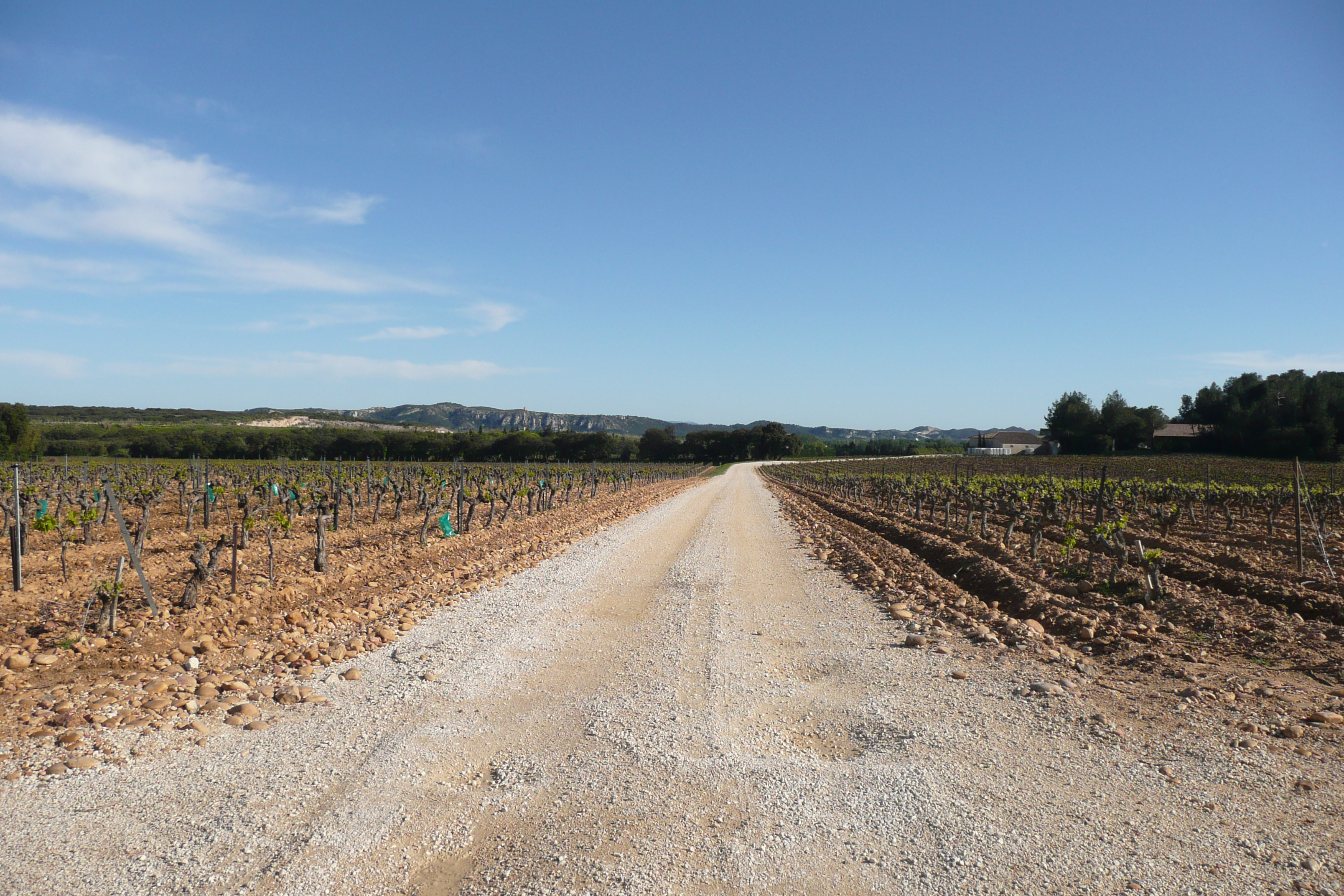 Paysage près de Tavel.